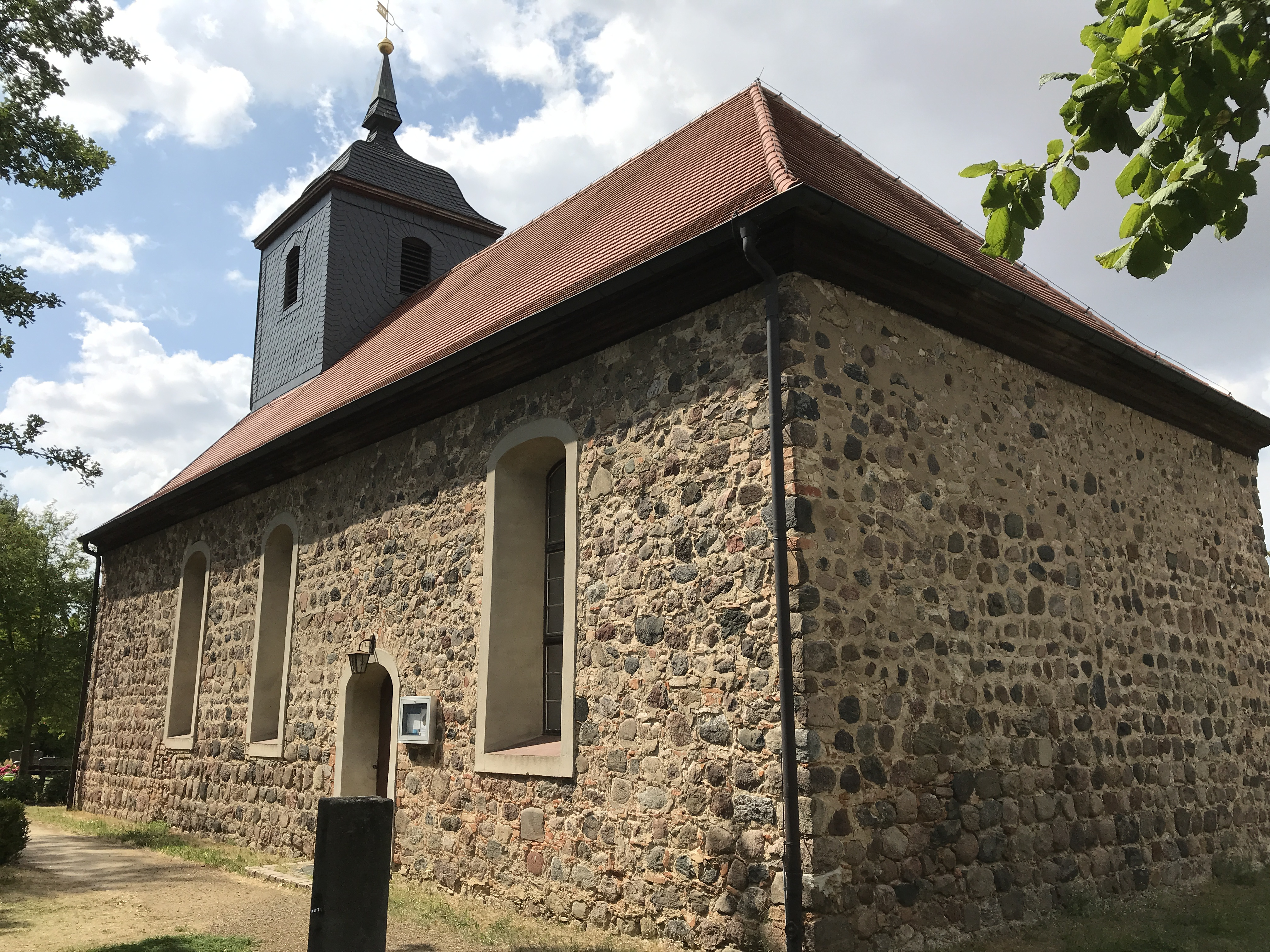 Die Dorfkirche Plötzin ist eine im Kern romanische Feldsteinkirche aus dem 13. Jahrhundert in Werder (Havel) im Land Brandenburg